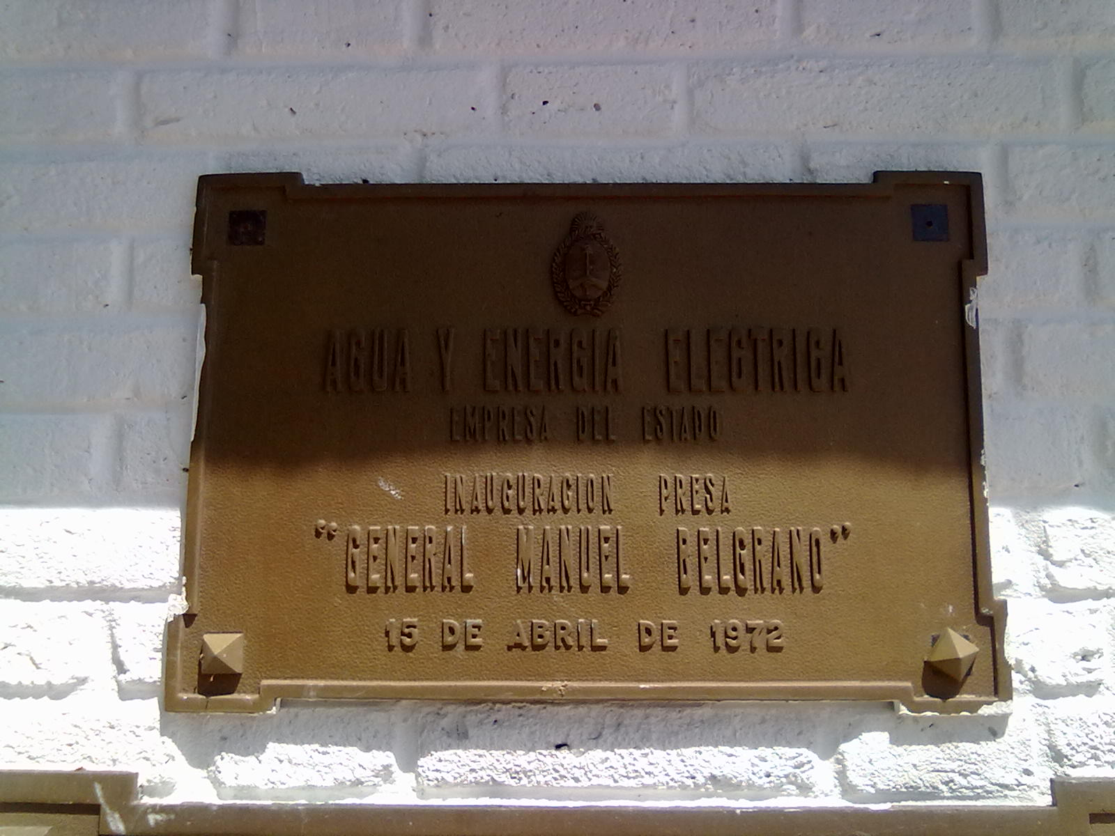 Placa conmemorativa de la inauguracion de la presa General Manuel Belgrano, Cabra Corral, Salta